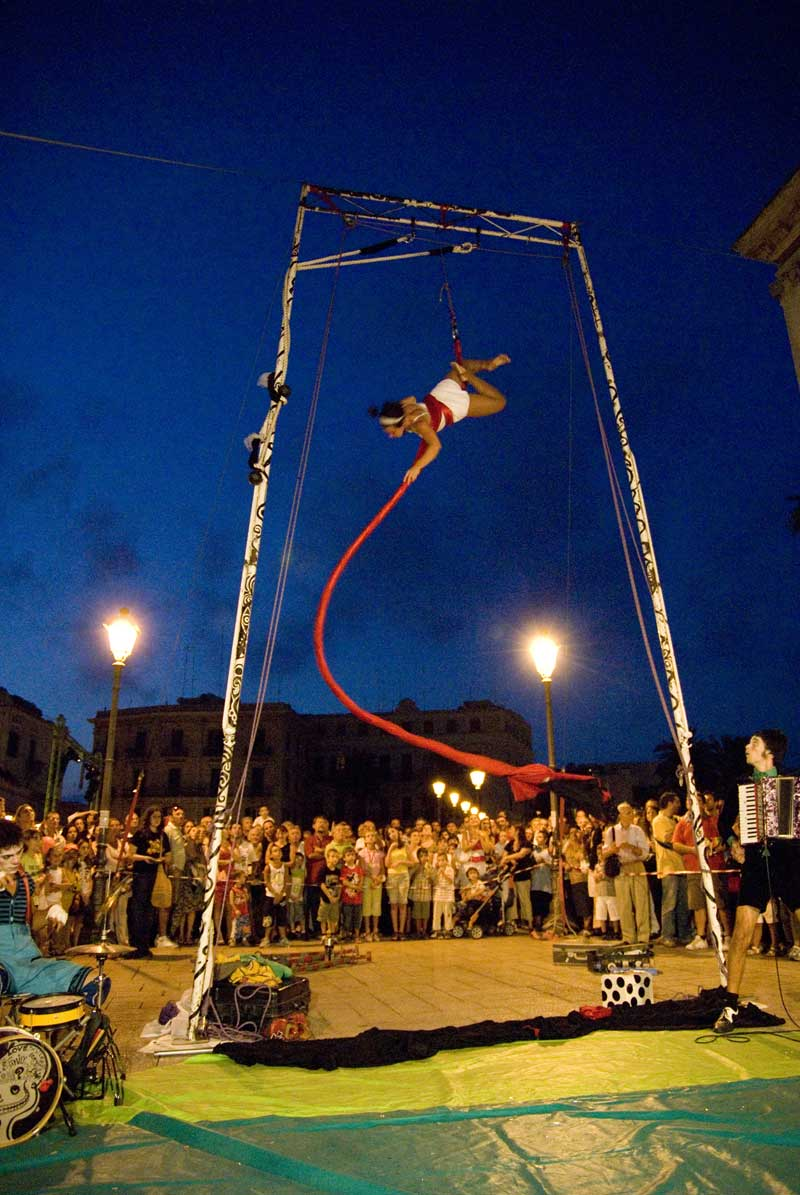 Acrobati